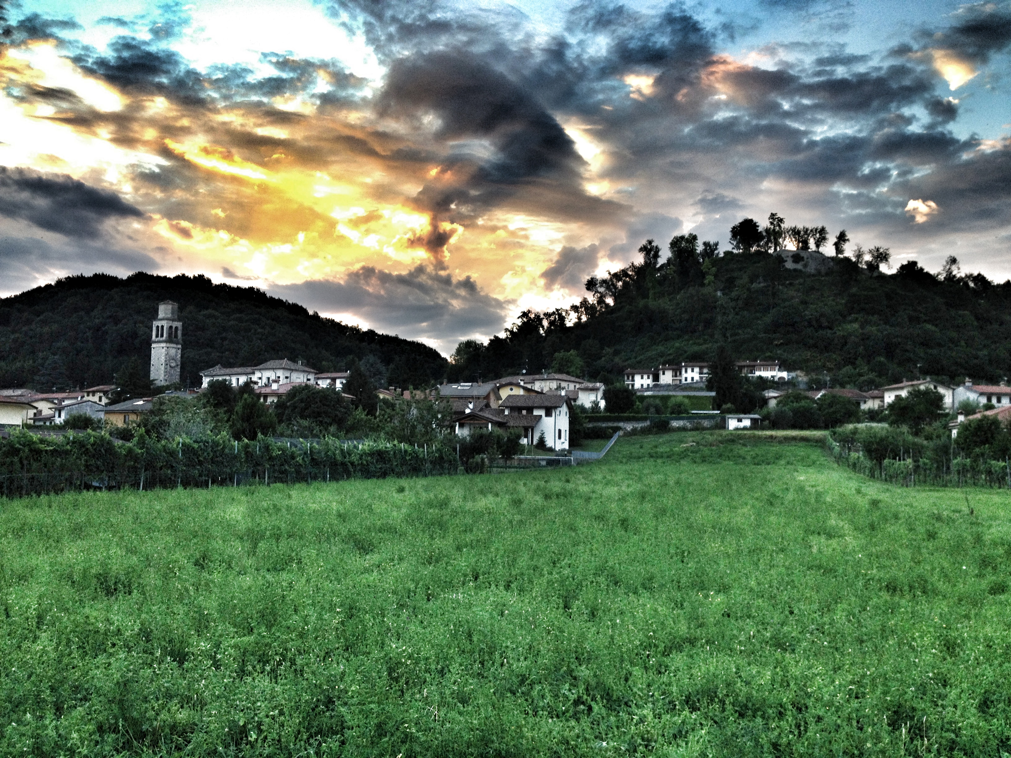 Panorama al tramonto di Pinzano al Tagliamento (PN). L'immagine è stata migliorata utilizzando Snapseed.